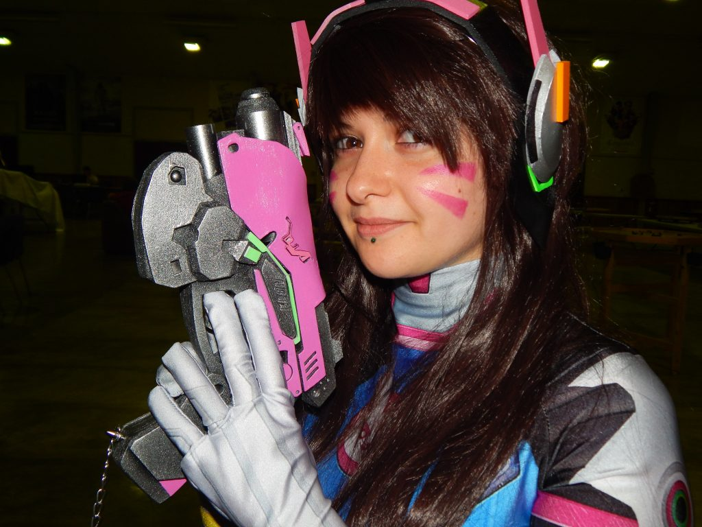 Cosplay D-Va Overwatch au RPGers